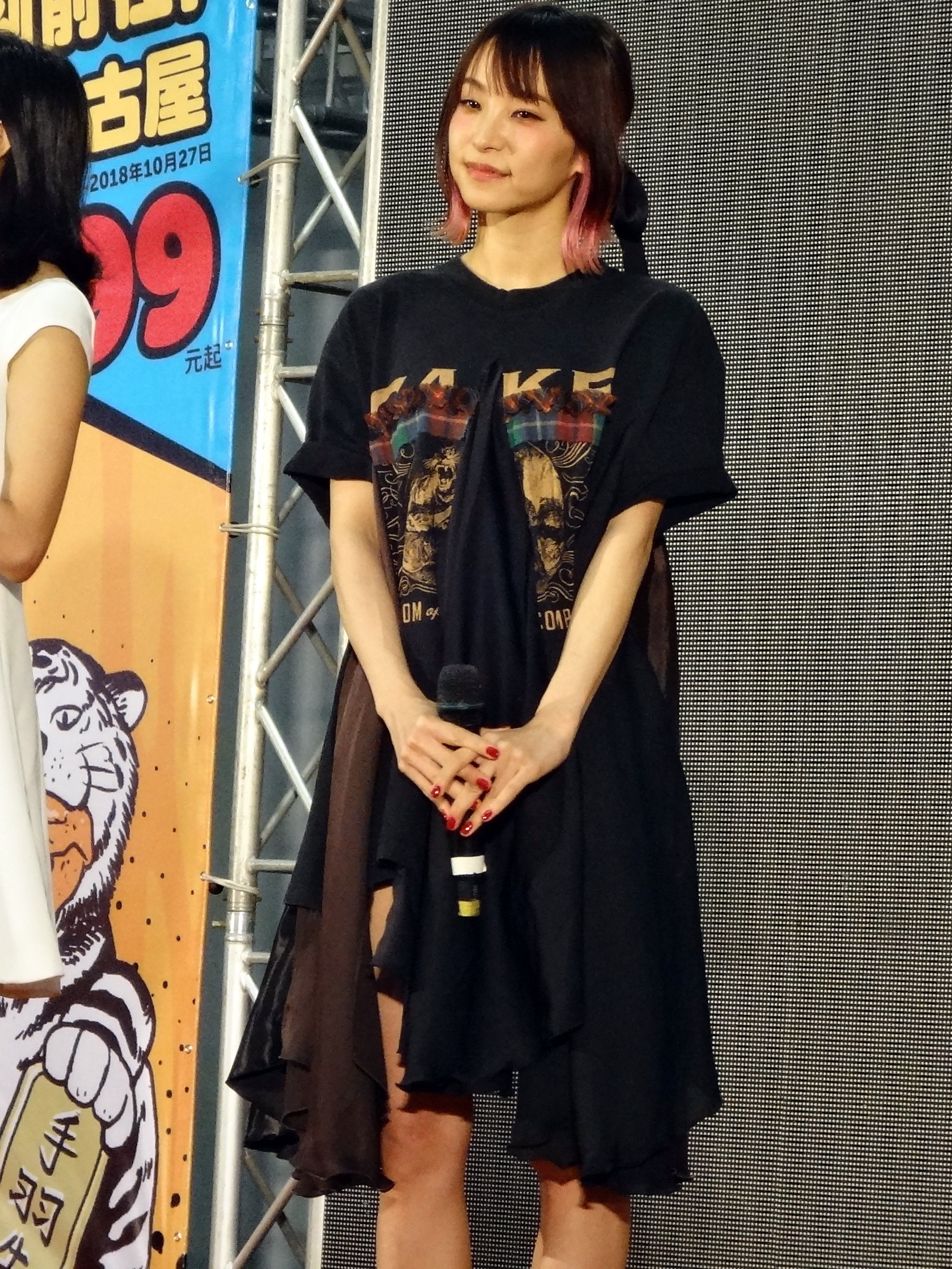 LiSA登上第28屆亞洲動漫創作展舞台。